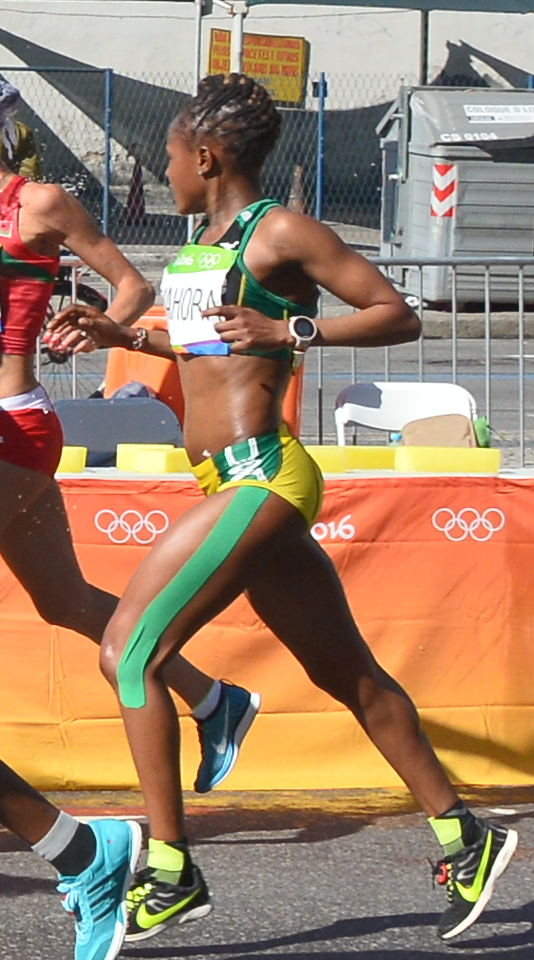 Passage du marathon des jeux olympiques de Rio 2016 dans le centre de Rio